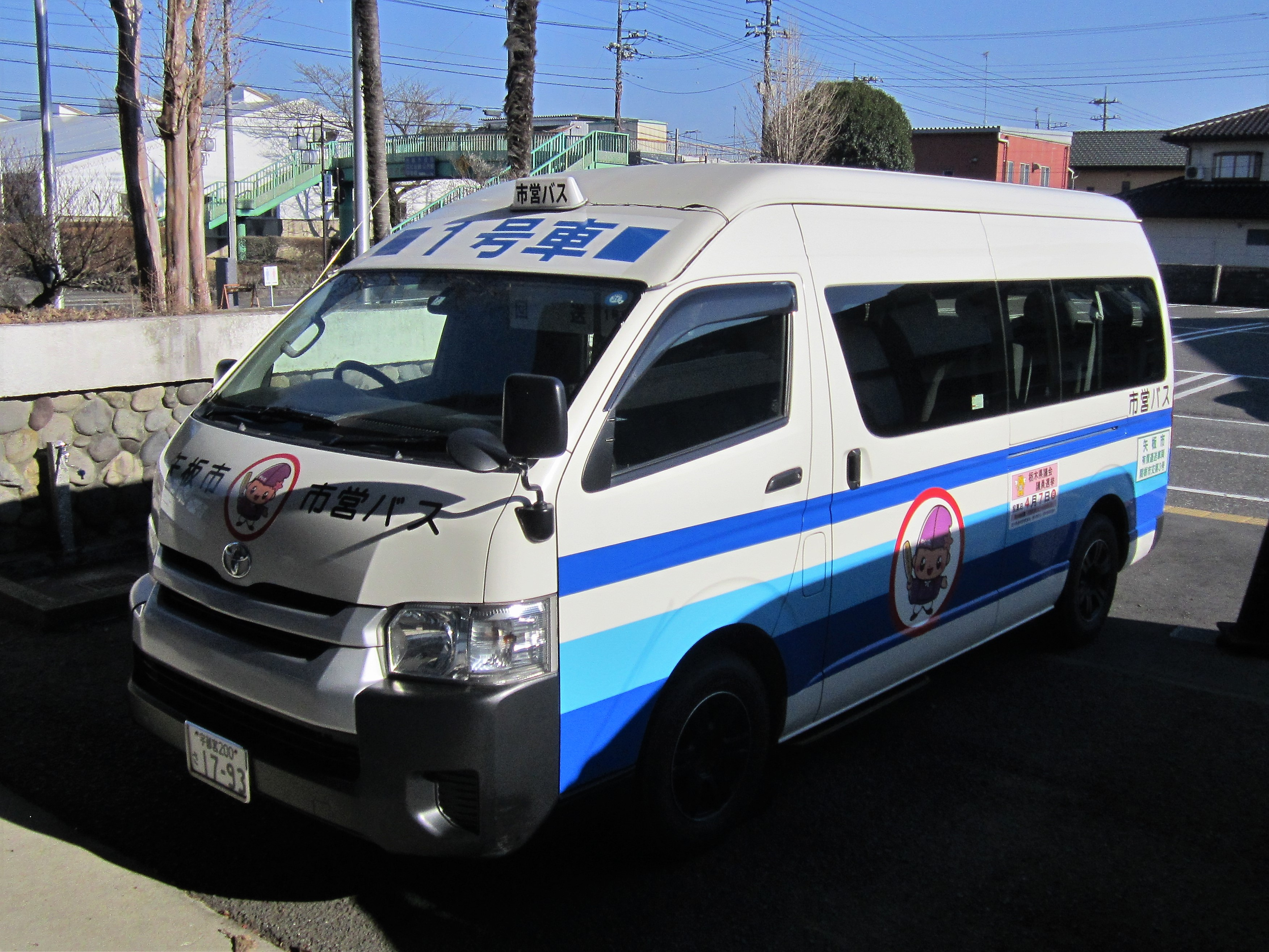 矢板市営バス1号車（矢板市役所にて） Canon PowerShot A2200